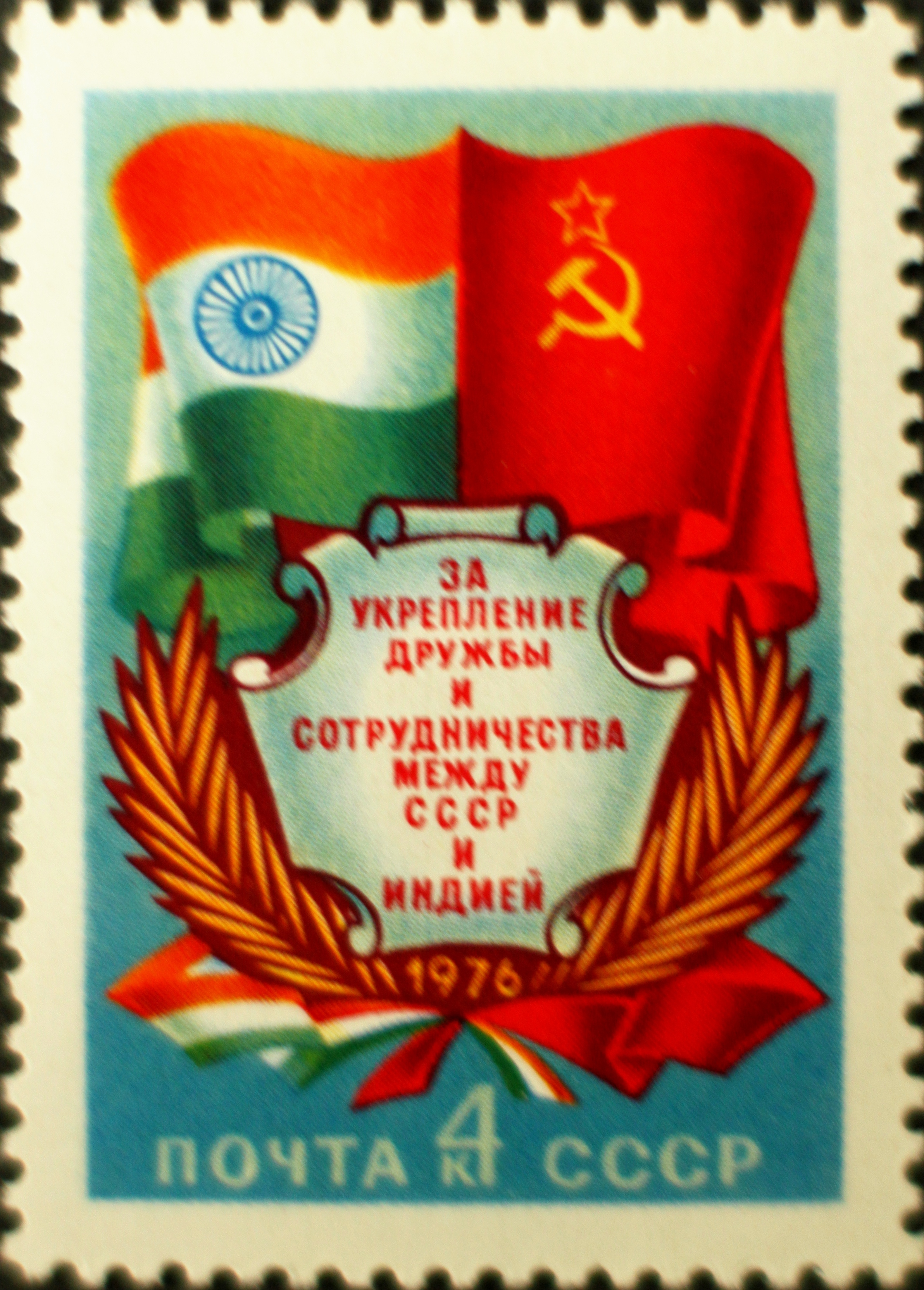 Briefmarke, Sowjetunion